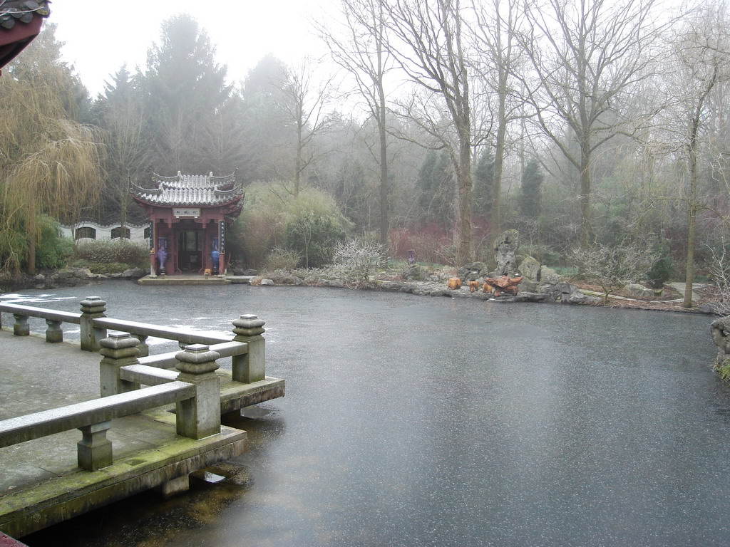 Martin Bakker, de fotograaf, stelt de foto beschikbaar. Hij deed afstand van zijn auteursrecht Hij schreef:"Hallo Robert en Gerard, dank voor je lovende woorden, de foto’s die ik stuurde, zijn inderdaad van mijn hand. ik heb geen copyright, gebruik ze naar eigen bevinden een goed weekend Martin